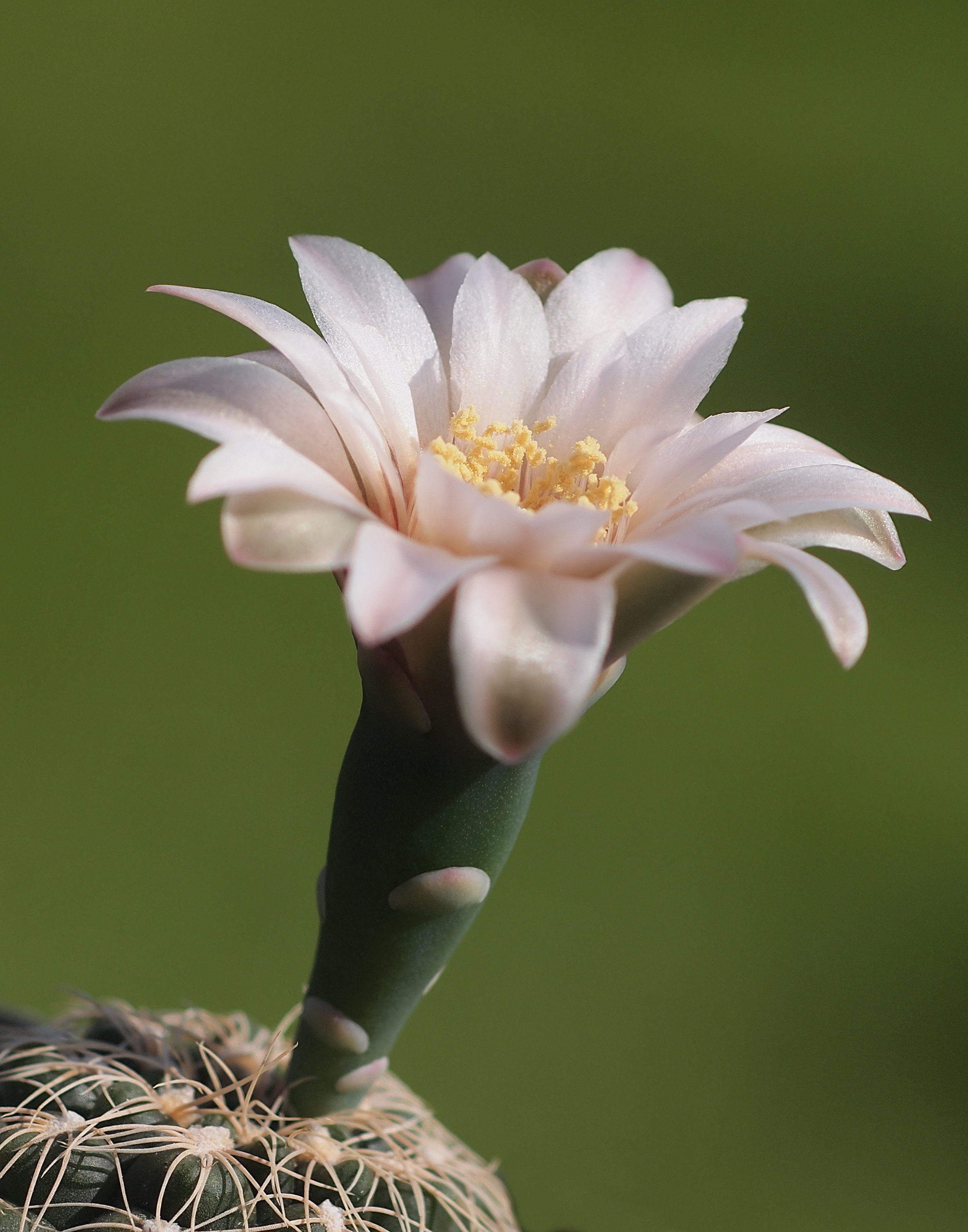 mit Pen und Canon FD 4/100